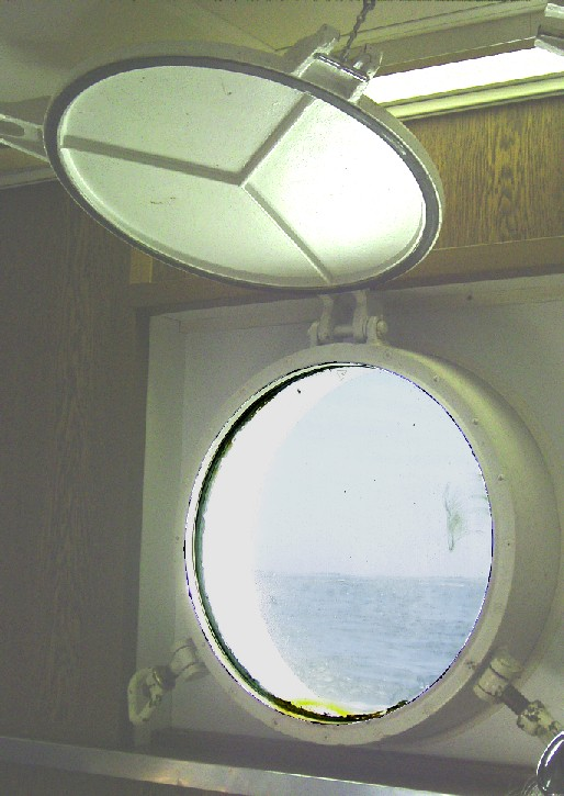 Bullauge mit hochgeklappter Innenabdeckung auf dem unteren Passagierdeck der Inselfähre Spiekeroog II. Die Klappe ist mit einem eingehängten Knebel an einer Kette unter der Decke befestigt. Bei bedarf wird sie mit zwei Flügelmuttern die unten rechst und links am Bullaugenrand zu erkennen sind vor der Fensteröffnung befestigt. Der in die Klappe eingelassene Gummiring wird dabei gegen einen scharfen Süll um die Fensteröffung wasserdicht angepresst.